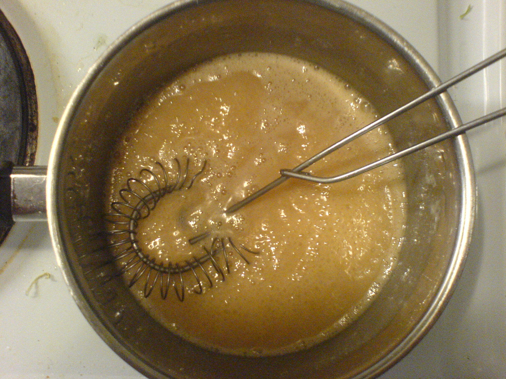 Kolasås beståendes av två delar vispgrädde, en del socker, en del sirap, vaniljsocker, ytterst lite salt. Dock ingen kakao, något som hade gett såsen en mörkare färgton.